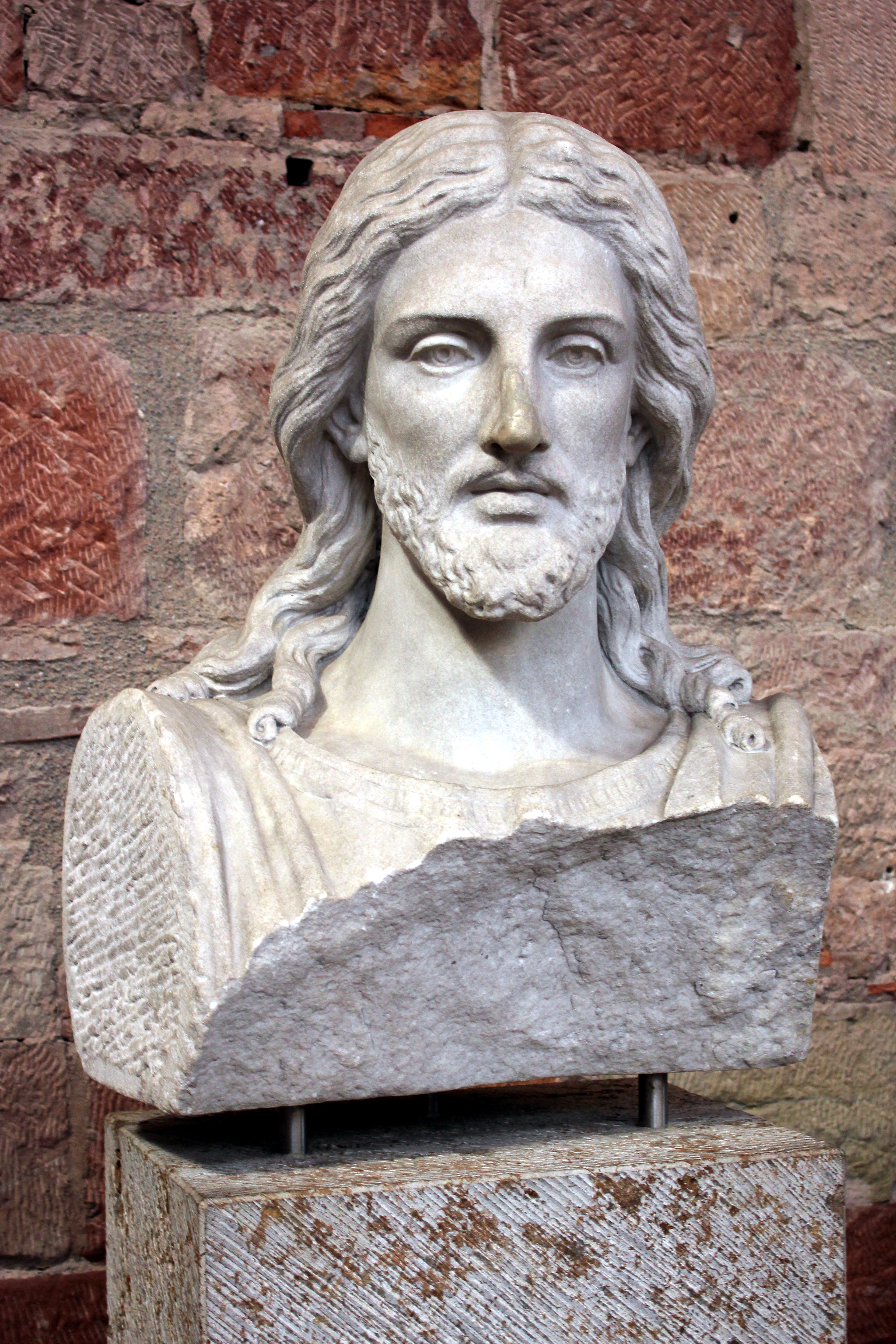 Jesus, Marmorbüste von Gustav Kaupert in der Konstantinbasilika Trier, um 1880)